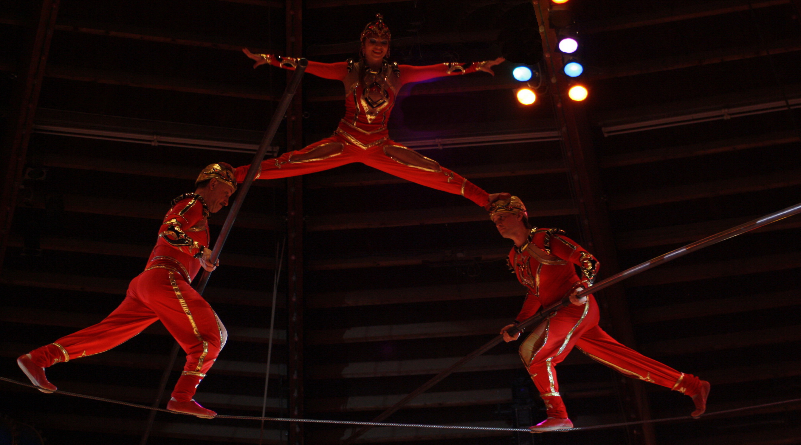 Hochseilartisten im Zirkus. Truppe Tsisov aus Russland.